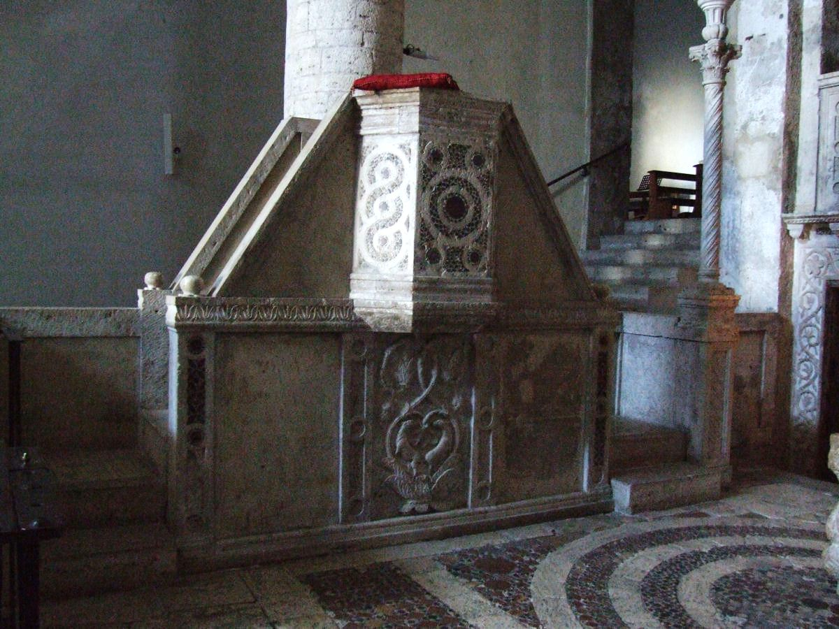 Santa Maria Assunta, Lugnano in Teverina, Italy - Cosmati Pulpit